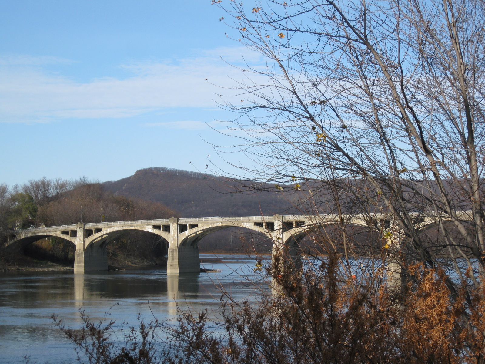 Pittston, Pennsylvania